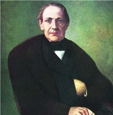 José Joaquin Prieto. President of Chile (1831- 1841).